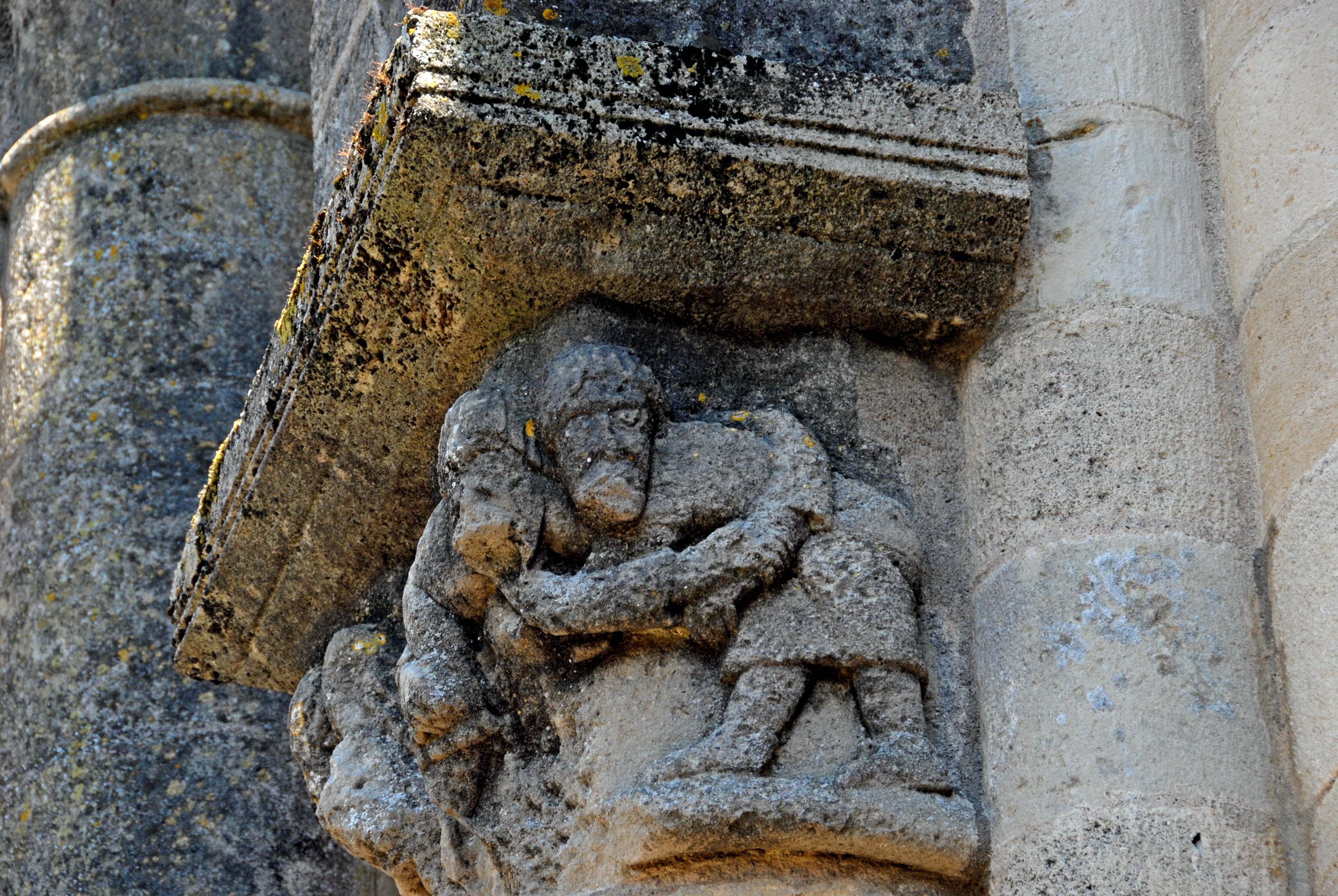 St.-Pierre-de-Marestay, Vierungfskapitell